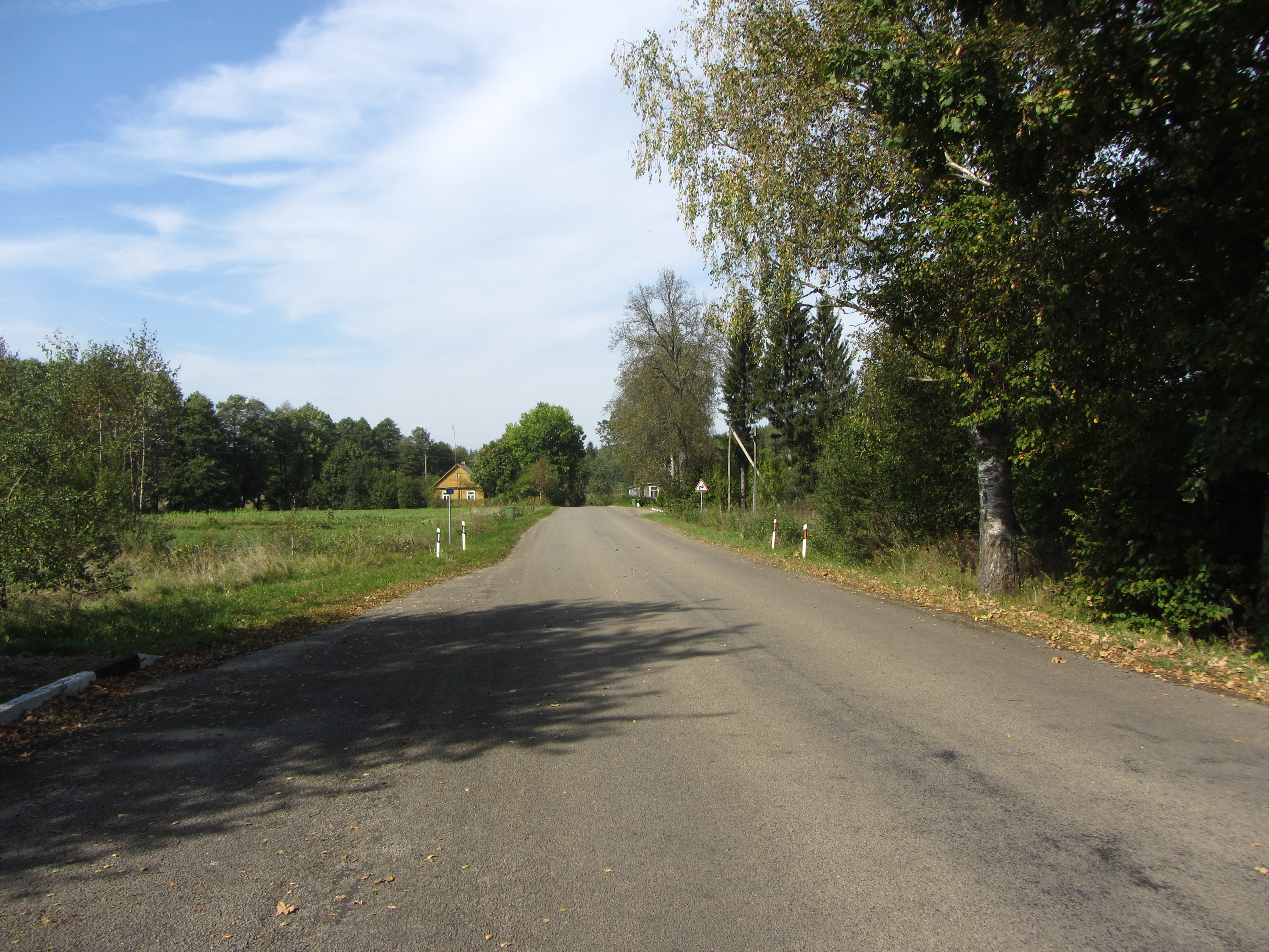 Roduka 65343, Lithuania